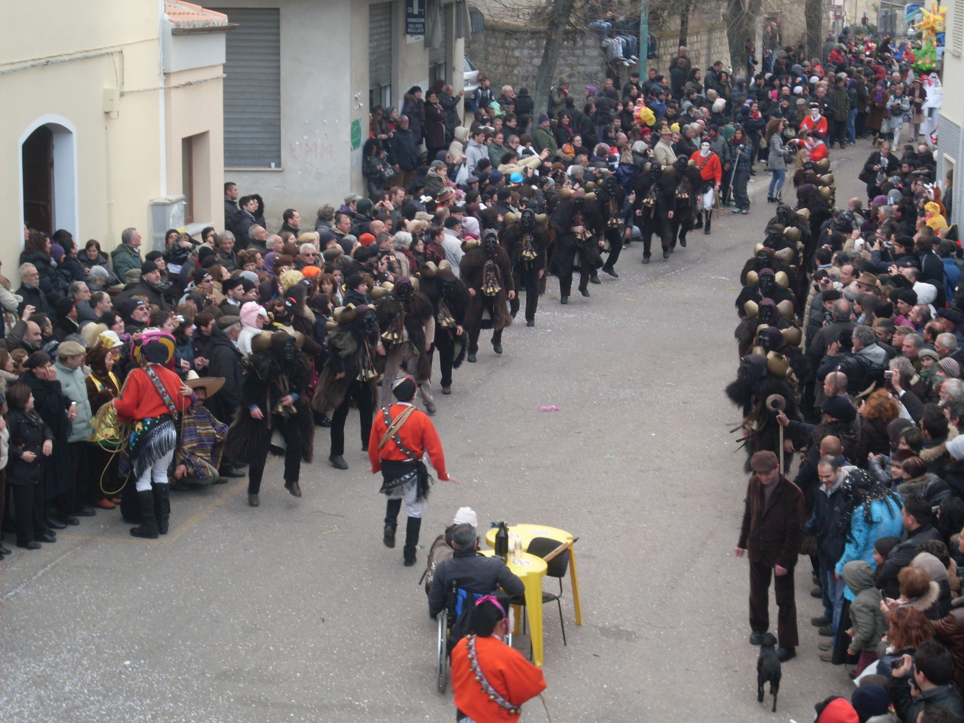 Issohadores y mamuthones durante el carnaval